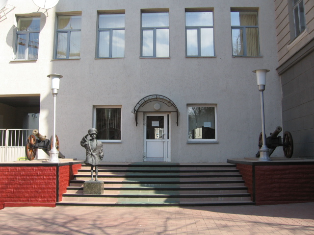 Вход (КПП)сбоку в Минское военное суворовское училище